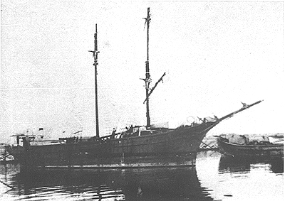 אוניית המעפילים "לקוממיות"